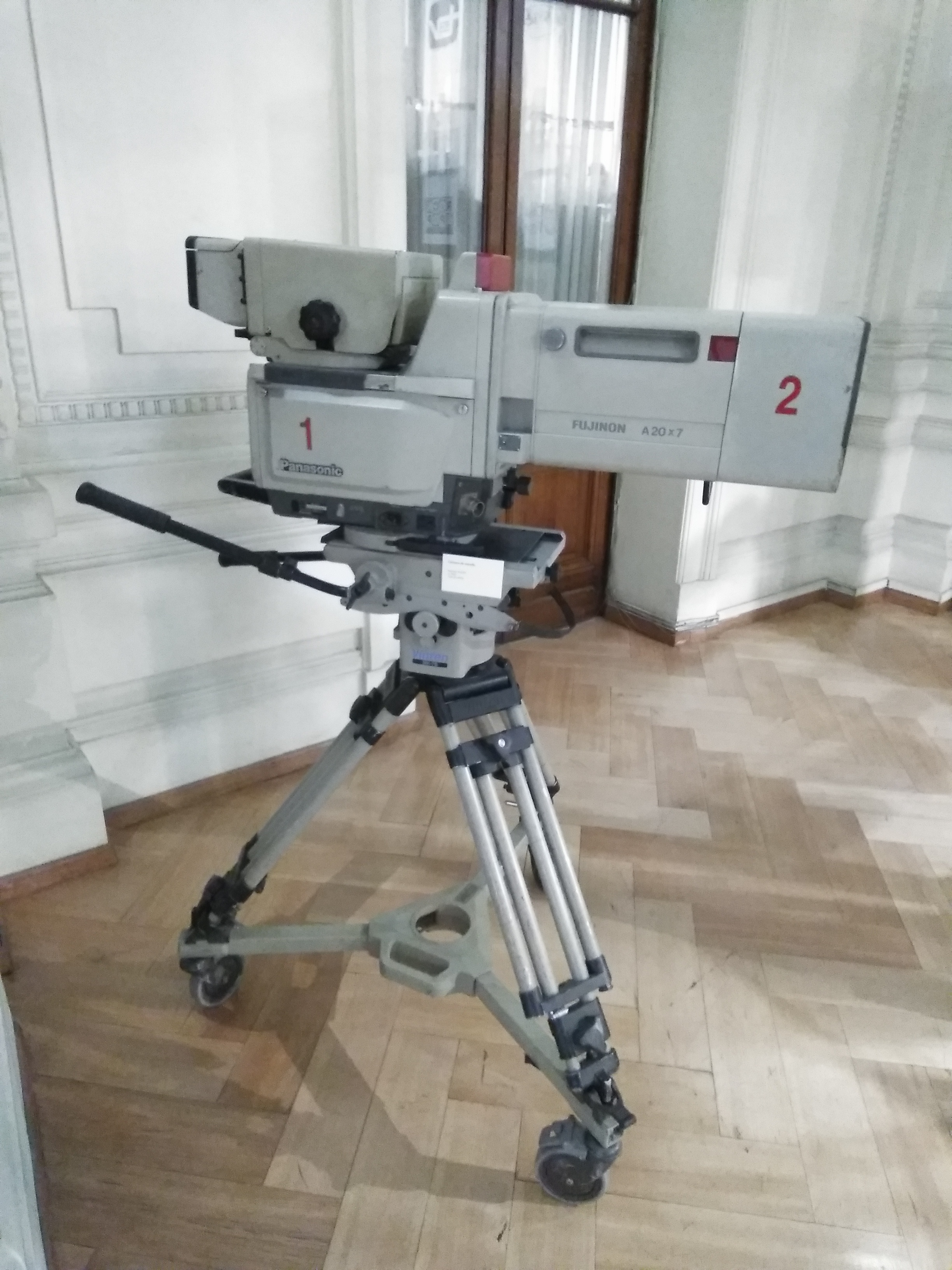 Antigua cámara de televisión perteneciente a Mega.